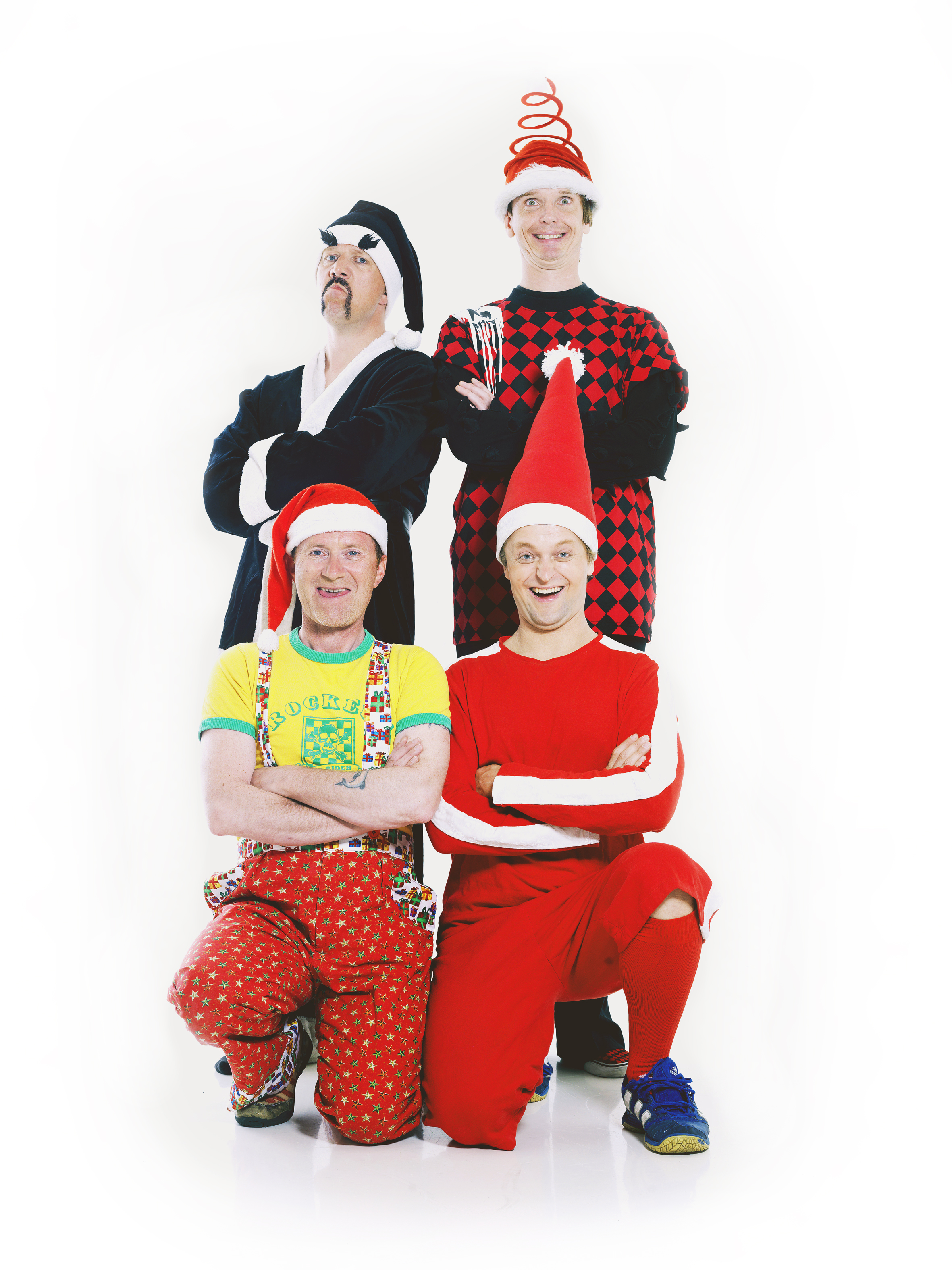 Svartnissen, Ove Rocketroll, Mr. Caboom og Kissa Nisseman